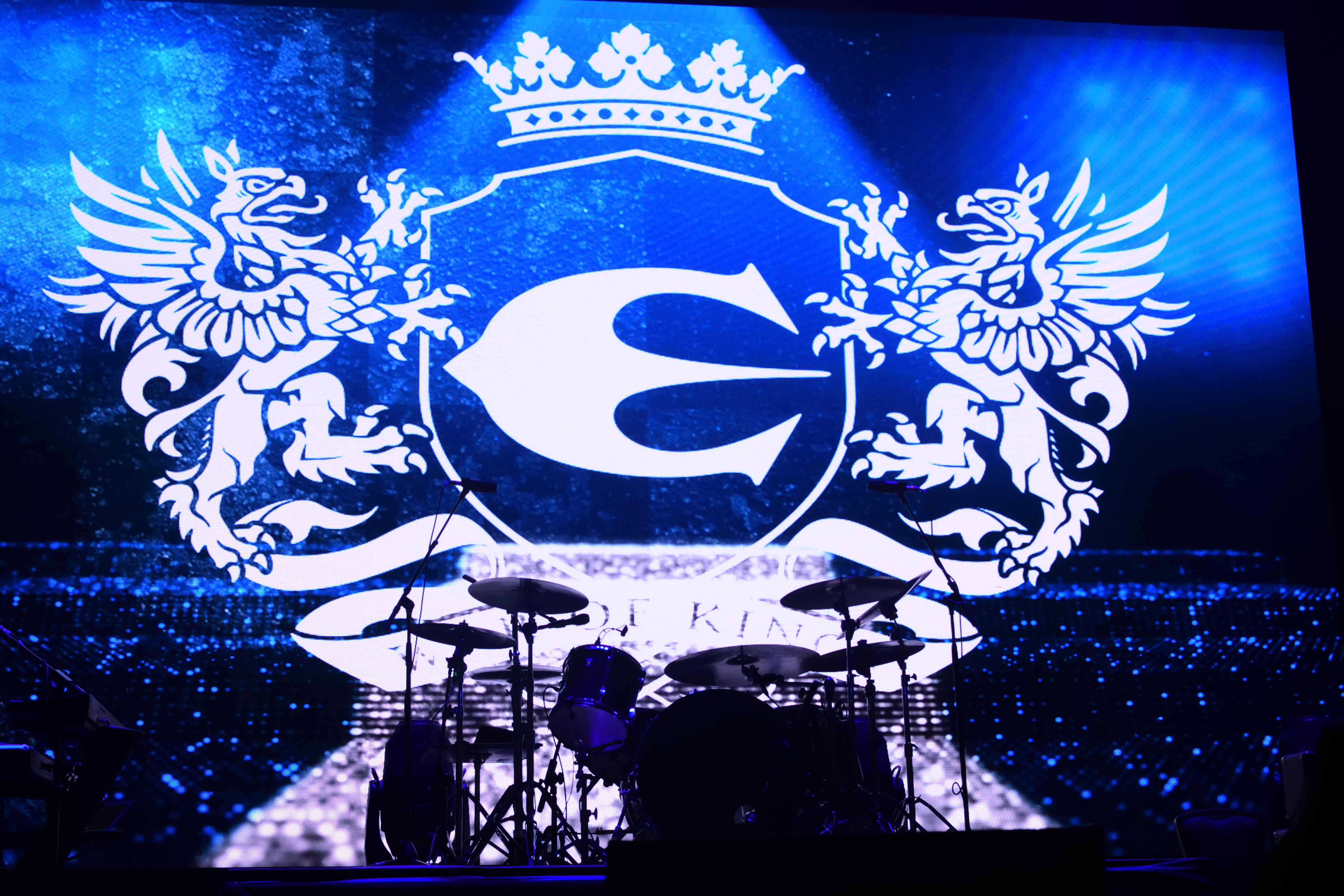 Europe in Gran Arena Monticello